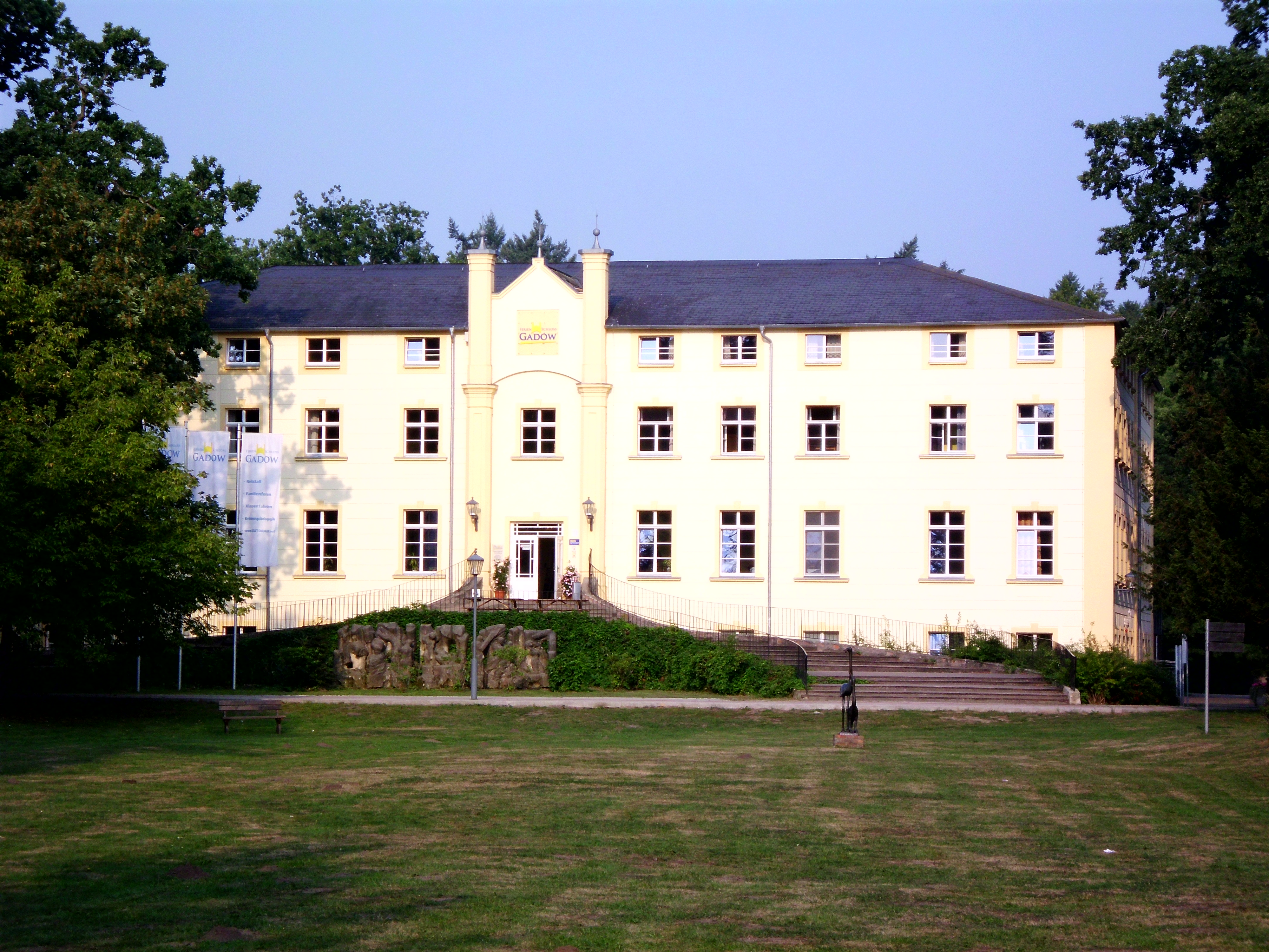 Schloss in Gadow, Gemeinde Lanz, das als Ferienanlage für Schulklassen und Familien genutzt wird